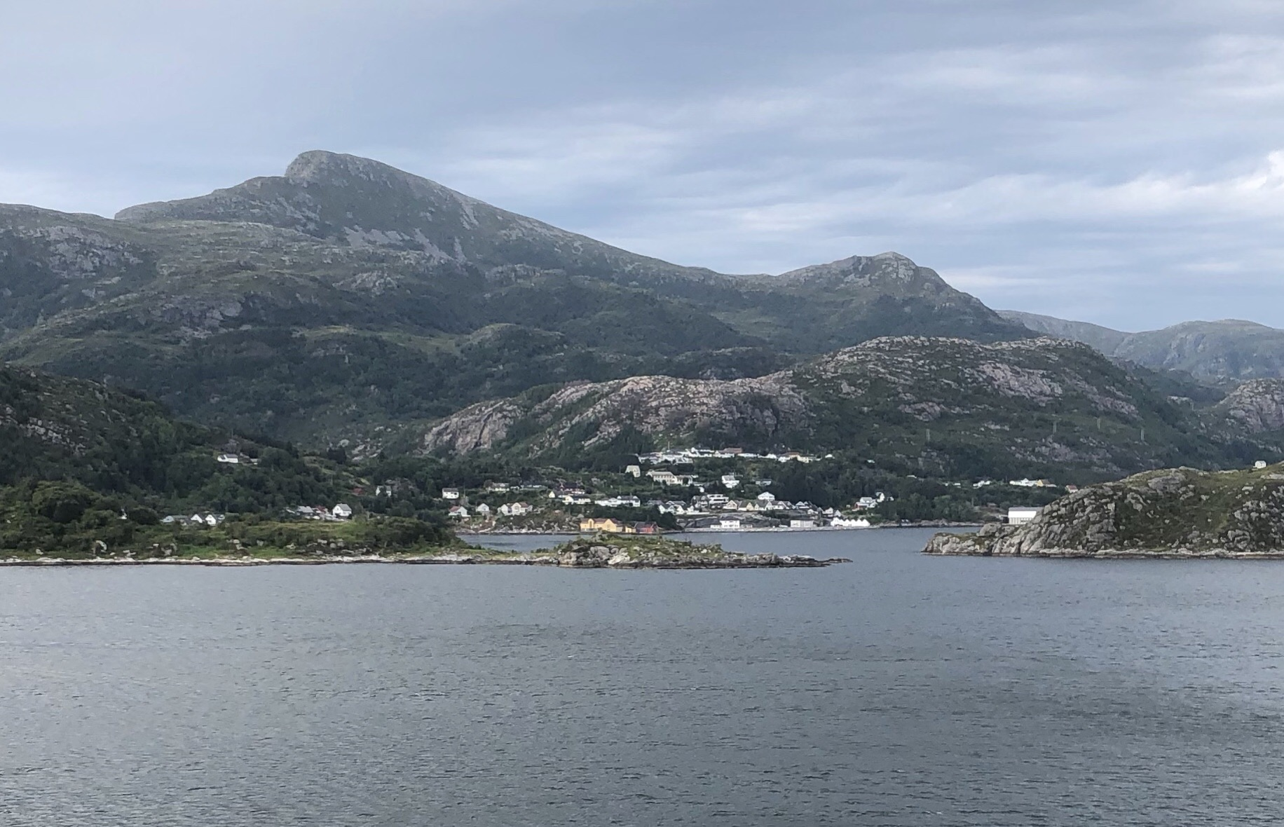 Blick auf Tennebø 2019